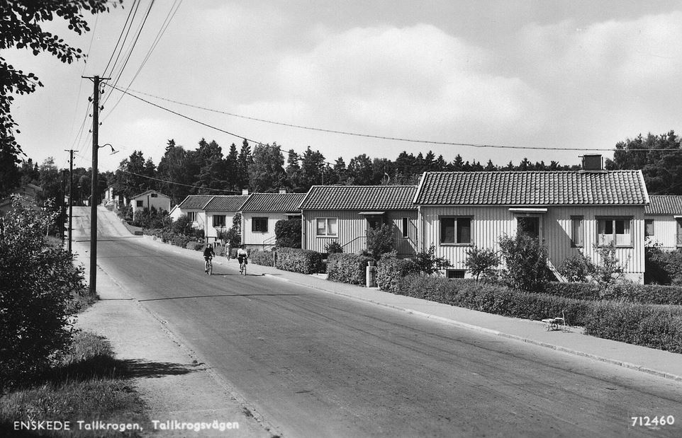 Tallkrogsvägen söderut